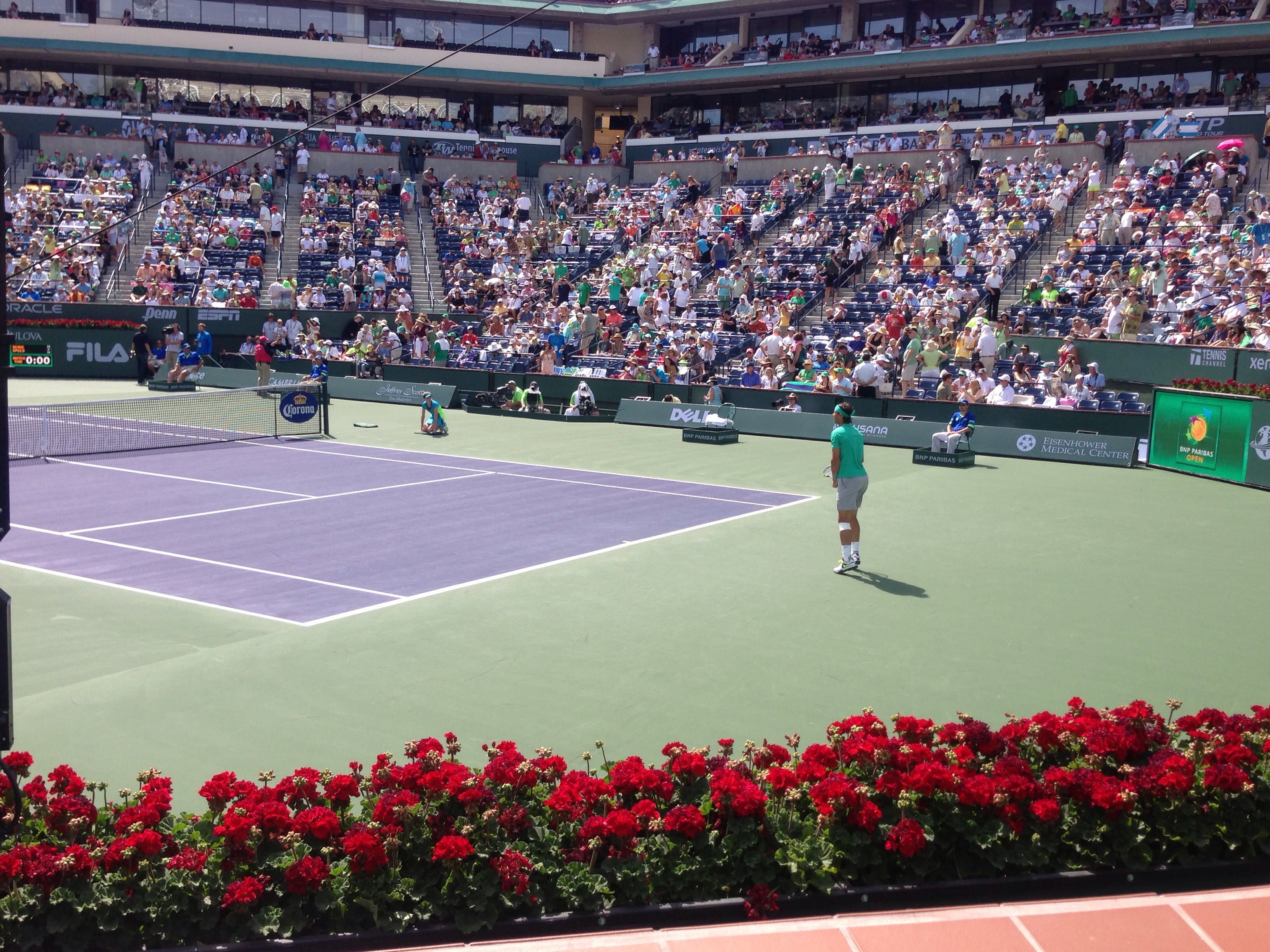 2013 BNP Paribas Open - Rafael Nadal vs Juan Martín del Potro (final)